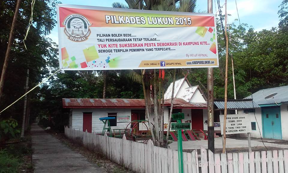 Simpang empat Desa Lukun